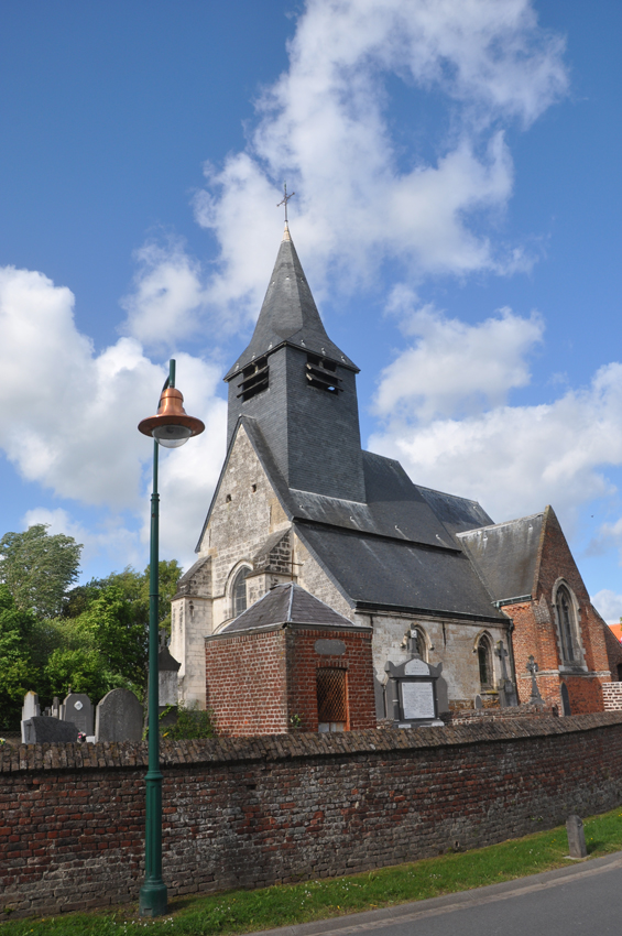 Eglise Saint Pierre de Tourmignies